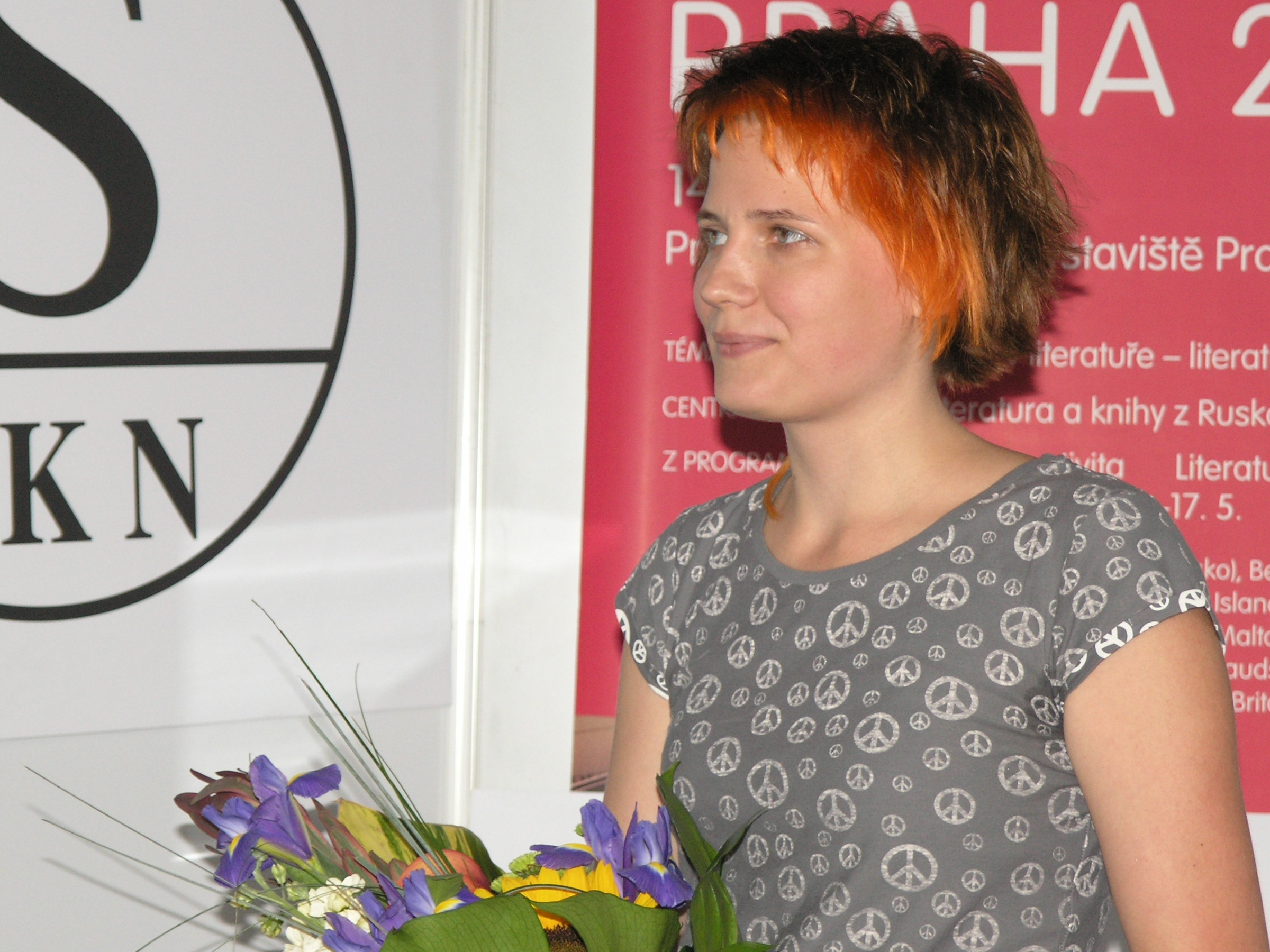 Praha, Svět knihy 2009 - Jana Šrámková při přebírání Ceny Jiřího Ortena